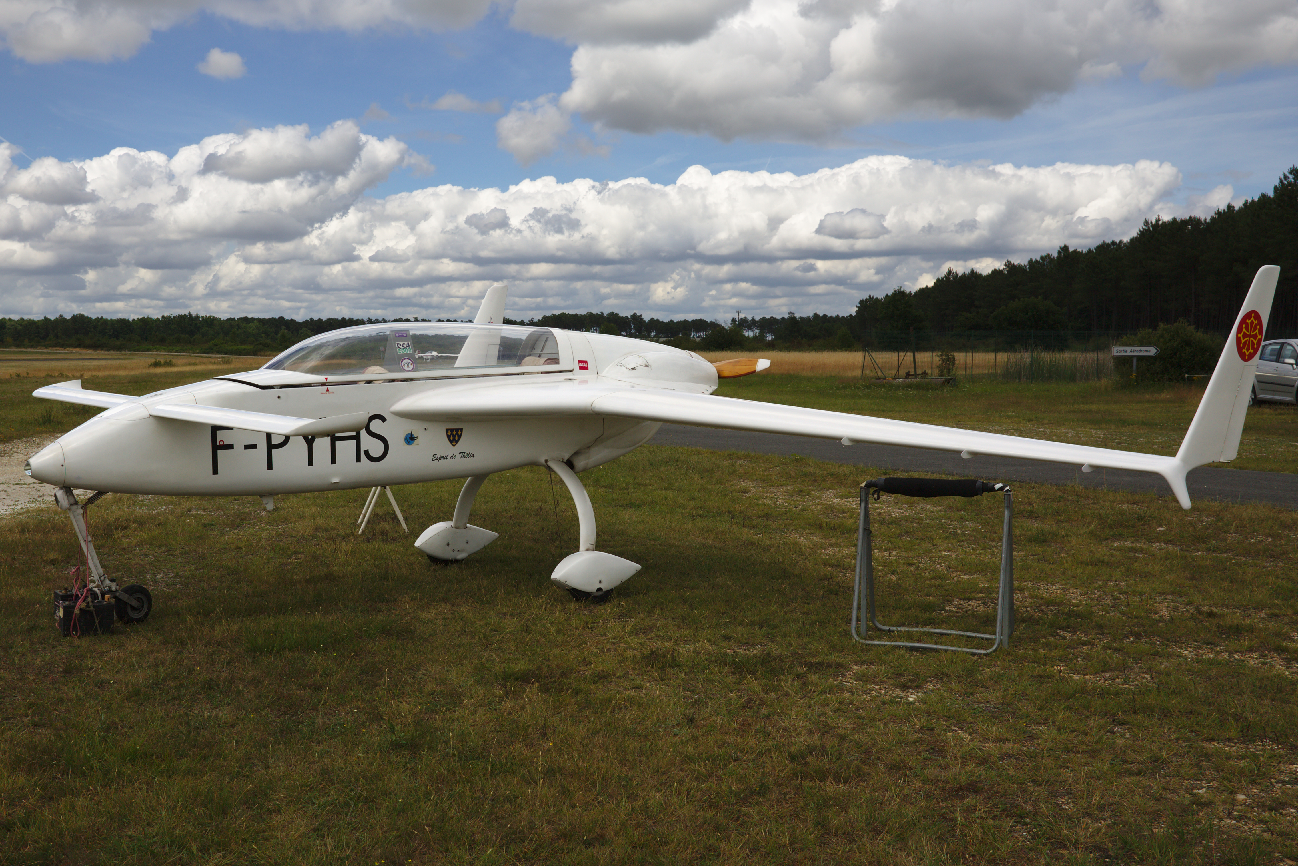 F-PYHS Rutan VariEze